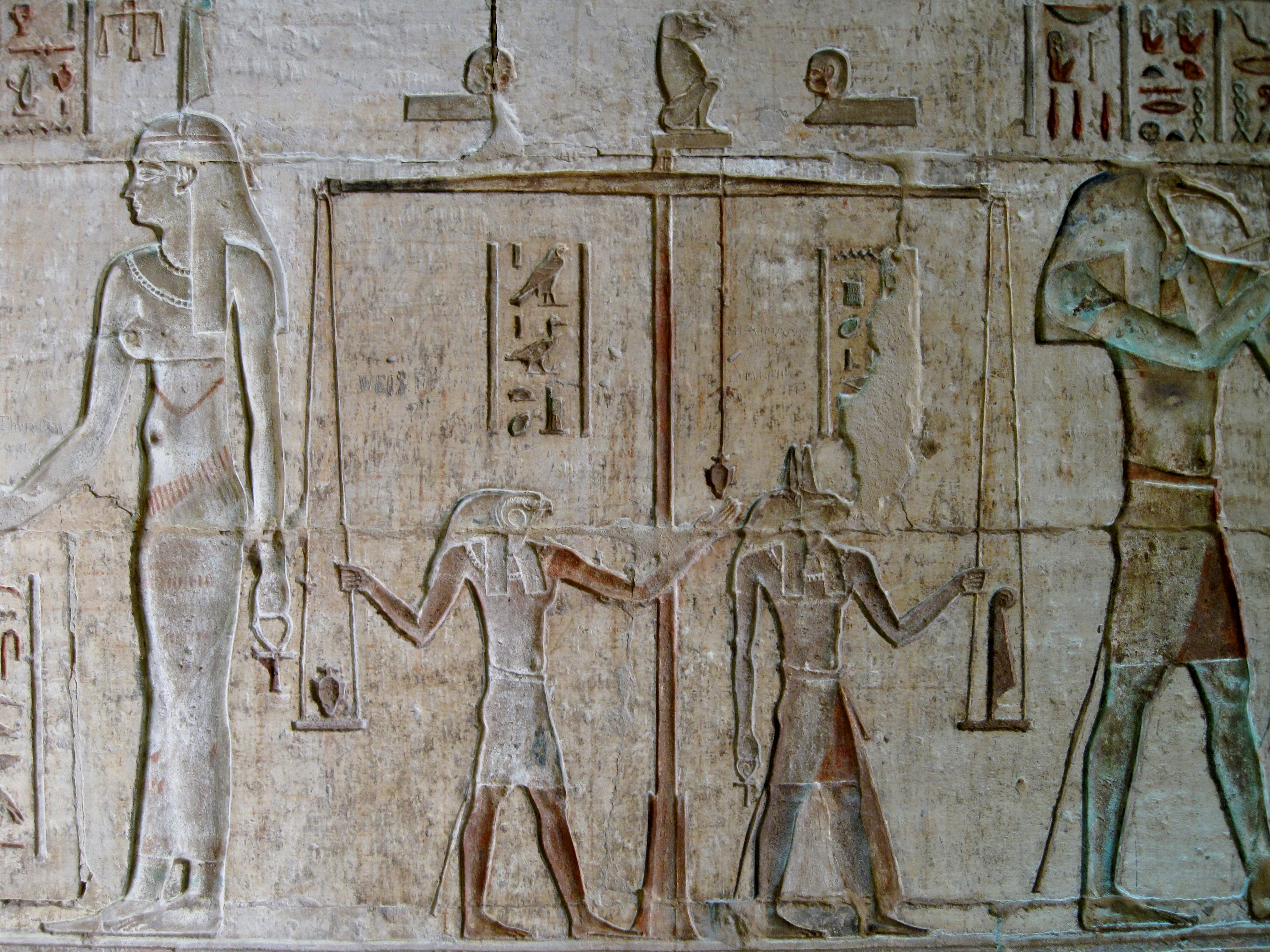 Relief im Innenraum des Hathor-Tempels von Deir el-Medina („Kloster der Stadt“), altägyptisch Set Maat („Platz der Wahrheit“), in Theben-West bei Luxor, Ägypten